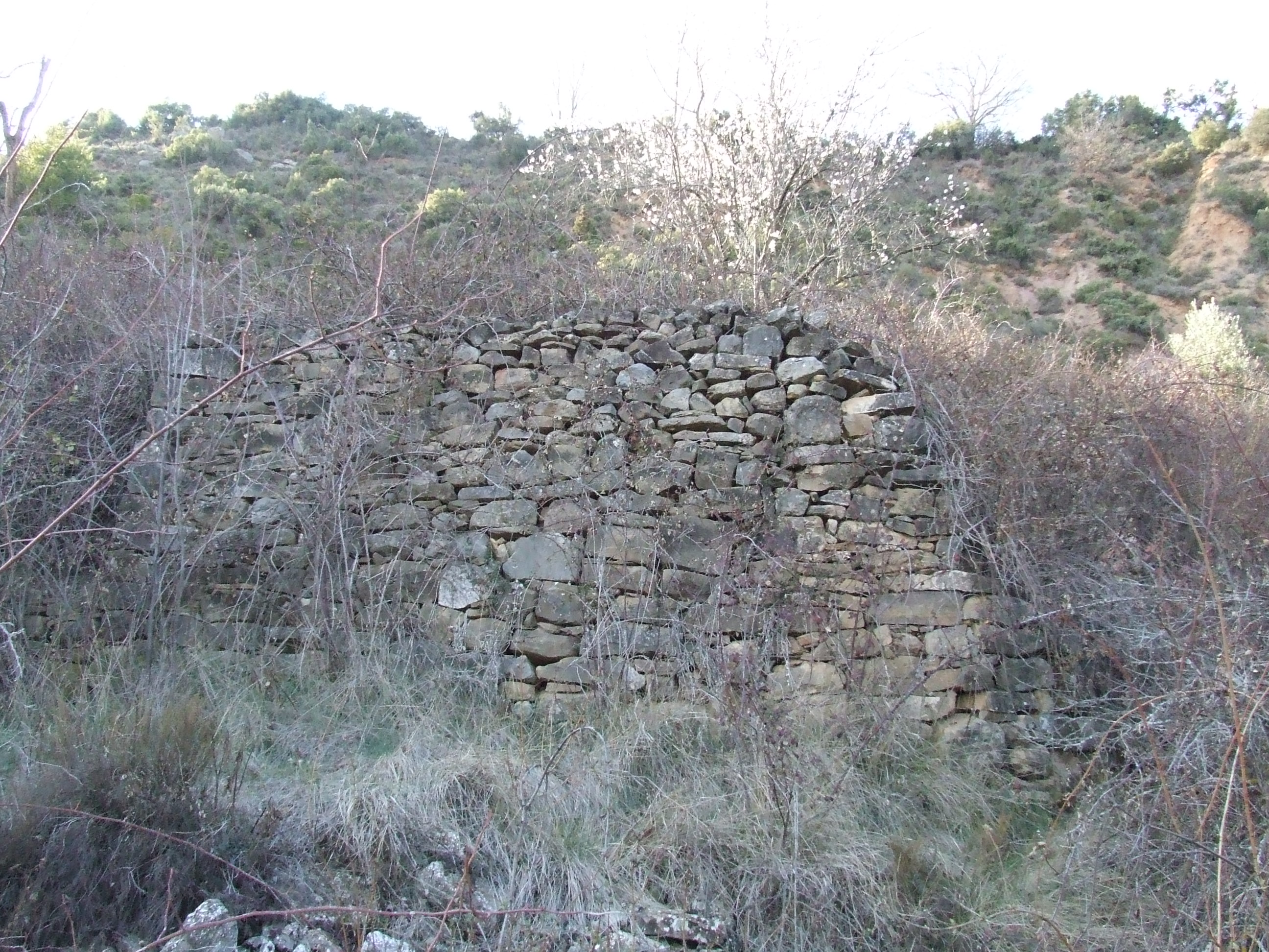 Casa Grives (Abella de la Conca, Pallars Jussà)